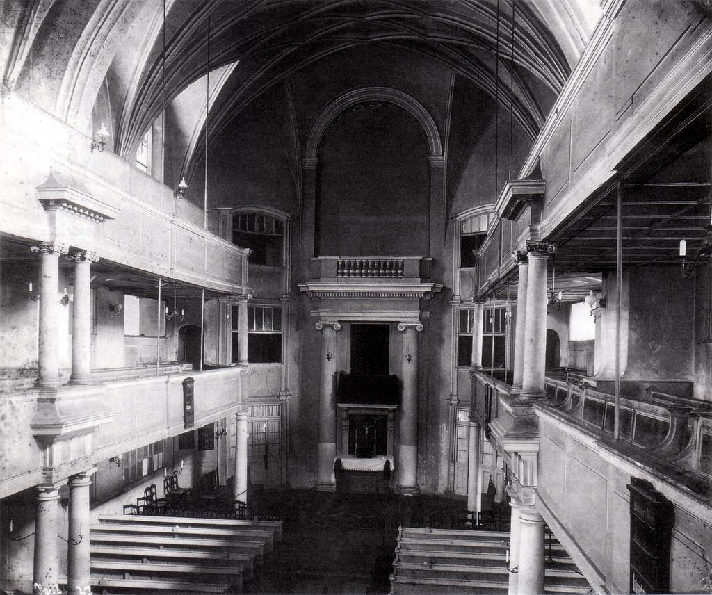 Alte Peterskirche Leipzig, Innenraum nach Osten.